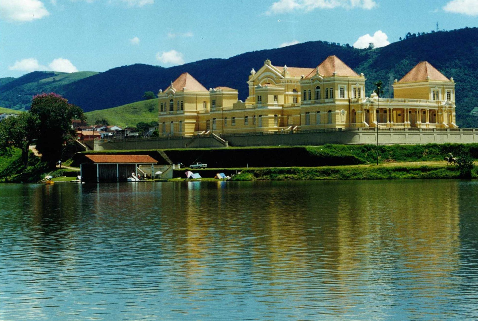 Palácio do Cassino do Lago Lambari - MG Brasil